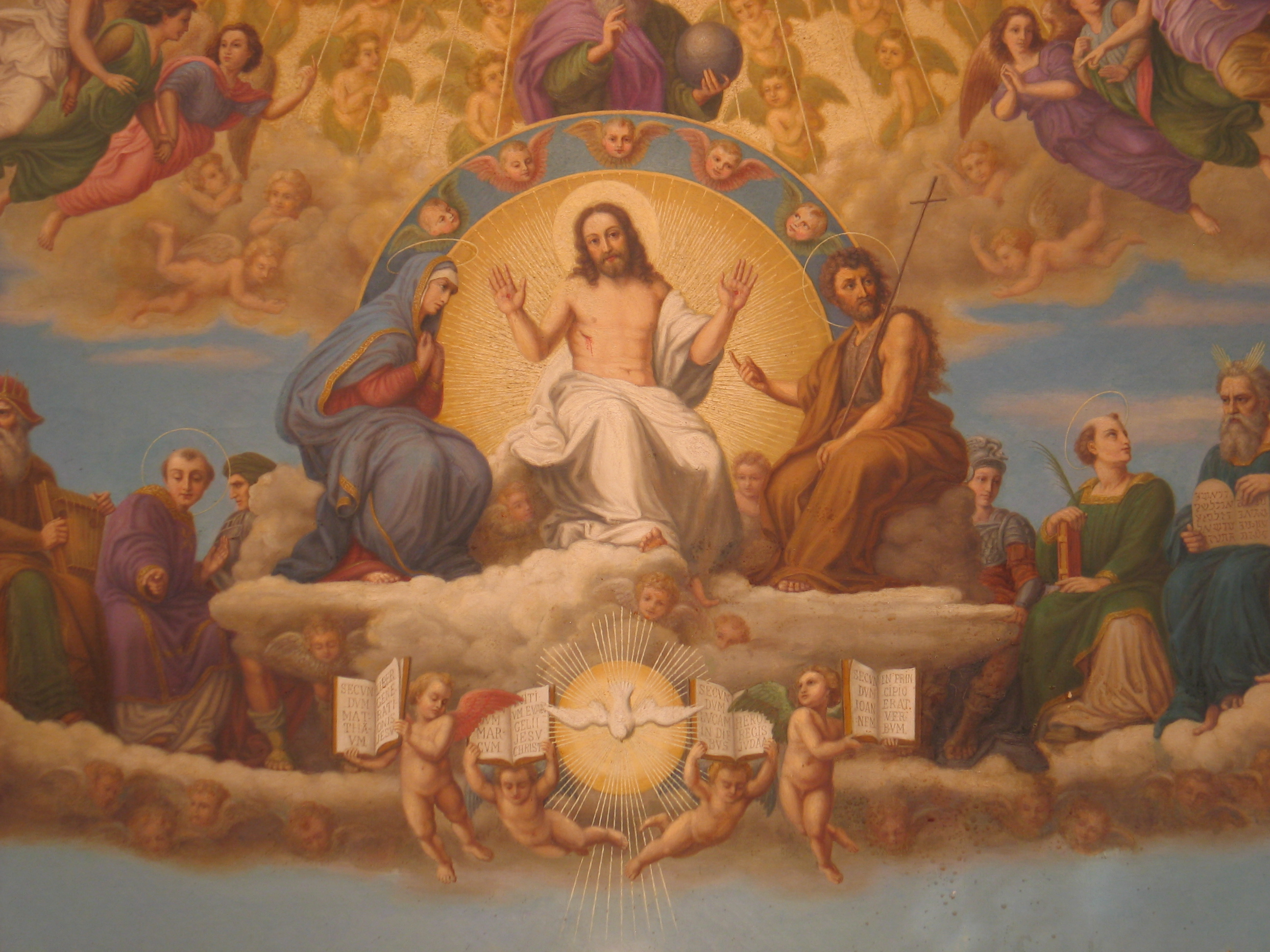 Philipp Ernst, Detailaufnahme von dem Ölgemälde Disputa nach Raffael, 1924-1932